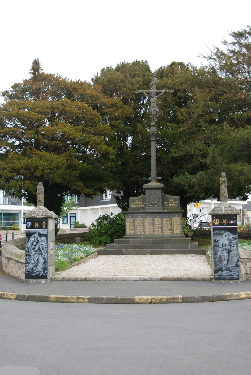 Monument aux morts - Plabennec-29